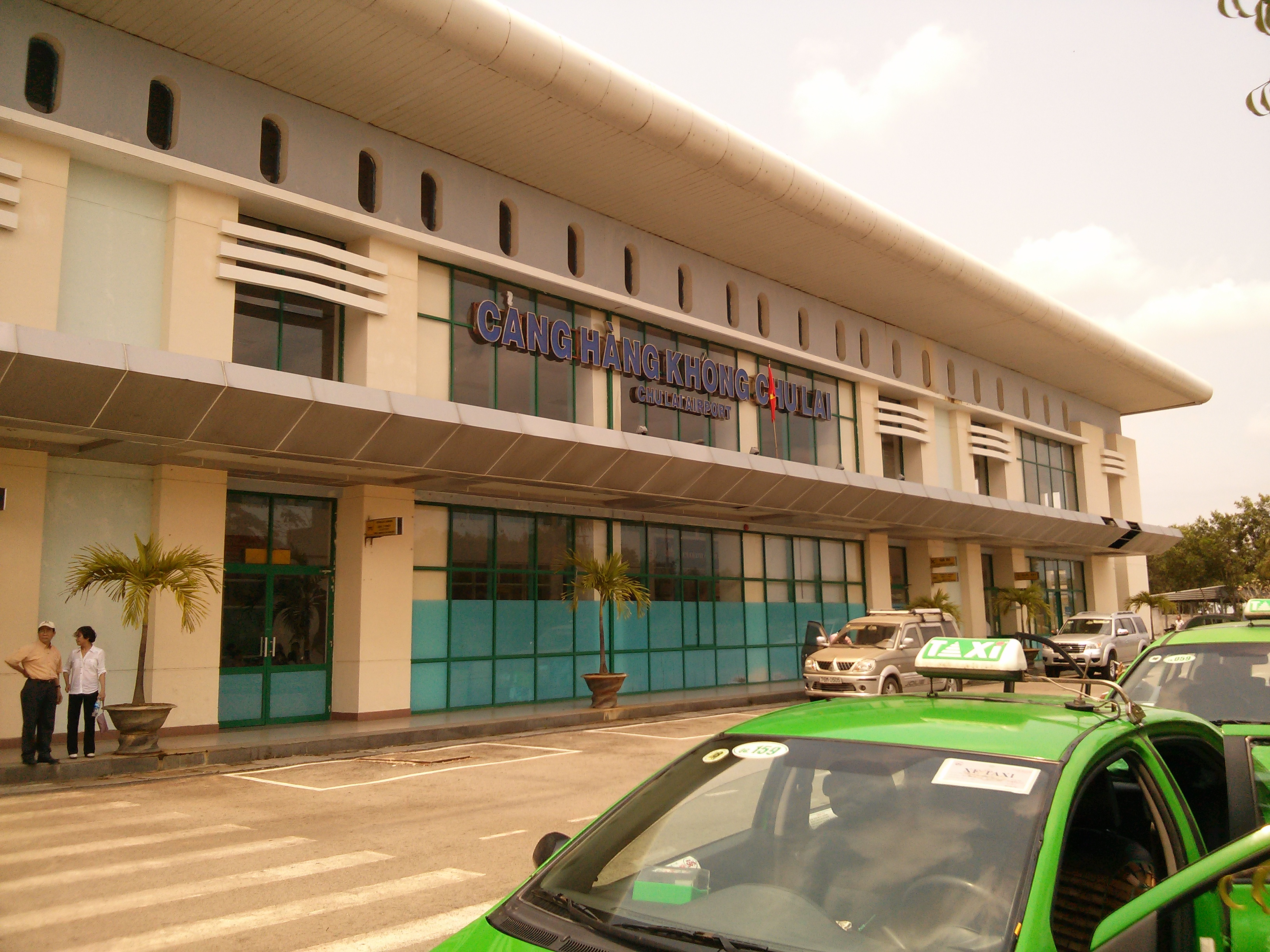 Chu Lai Airport Sân bay Chu Lai 5/2013